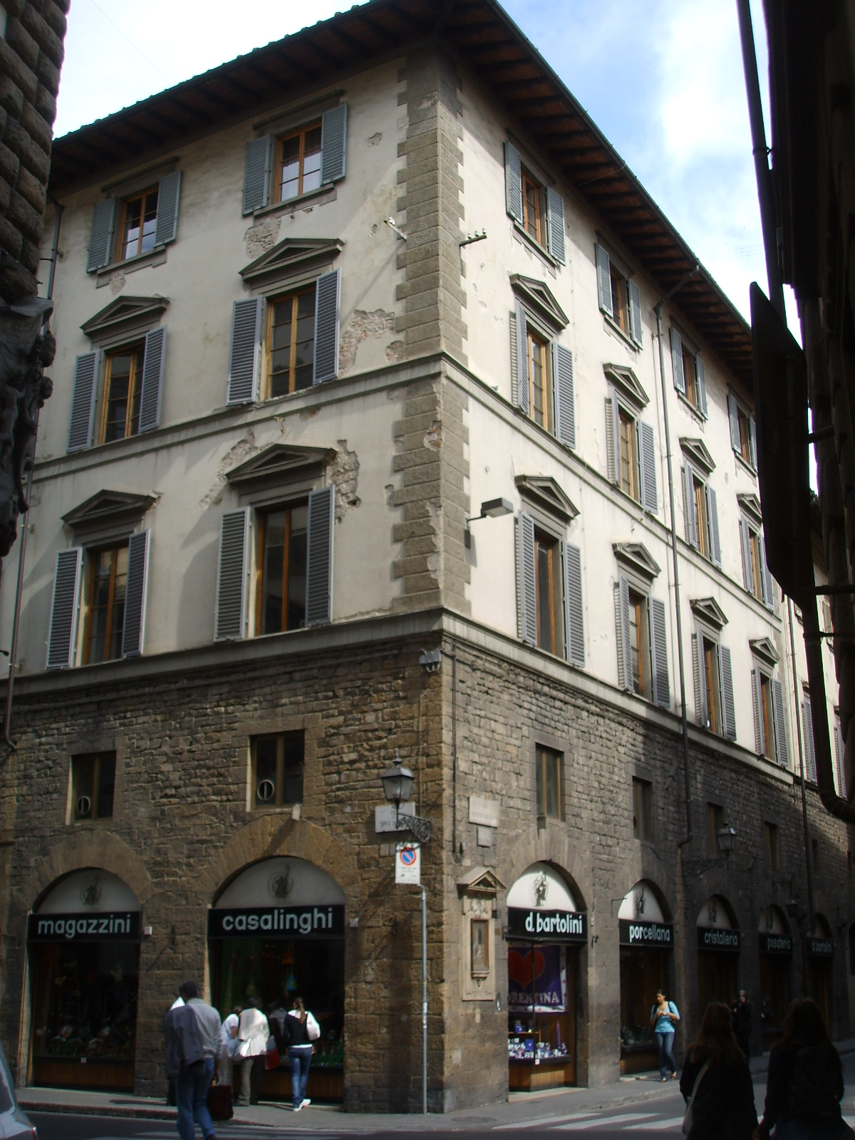 Palazzo_Pasqui in Florence